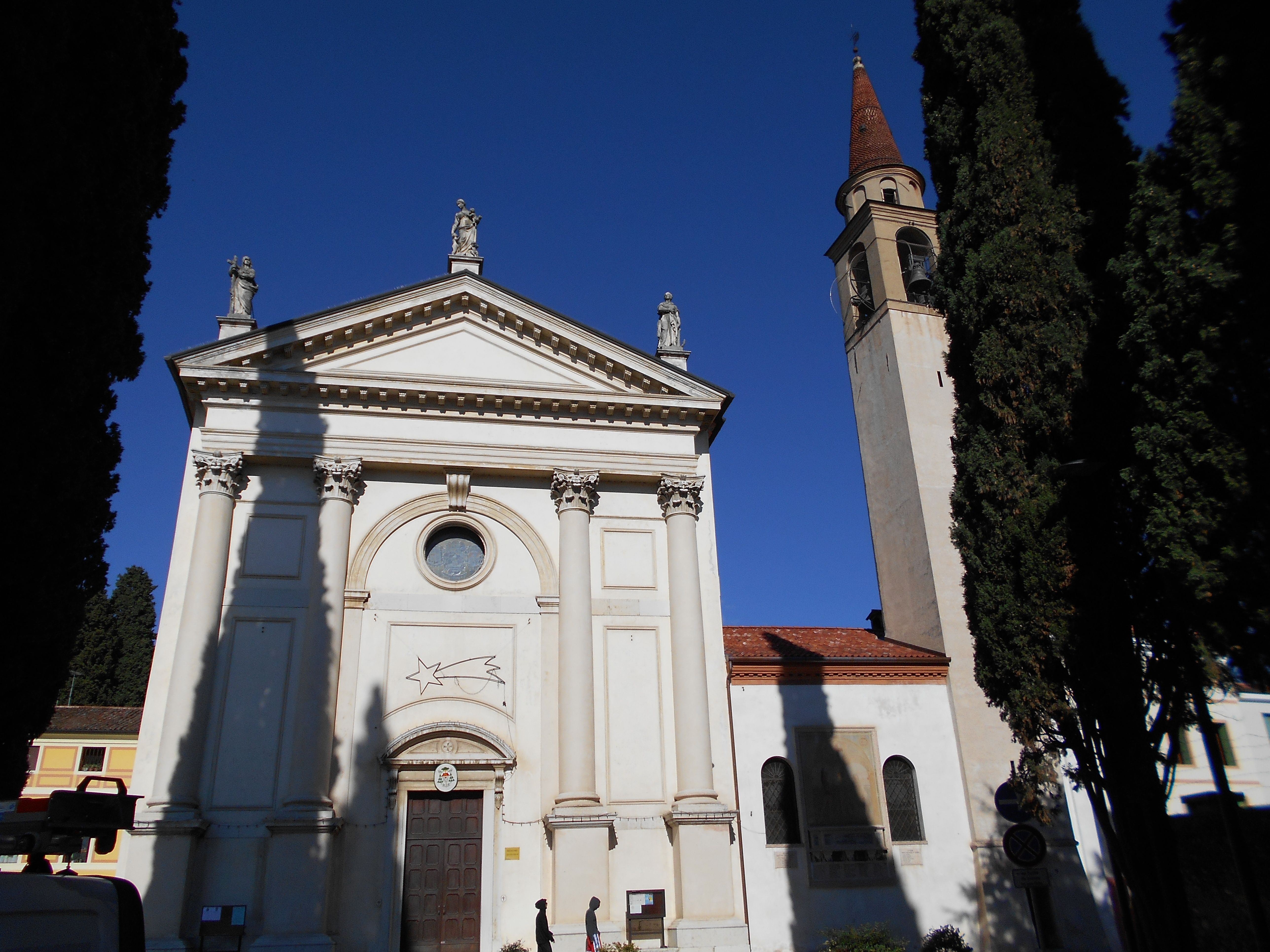 chiesa della Trinità, Bassano del Grappa, architetto Giovanni Miazzi